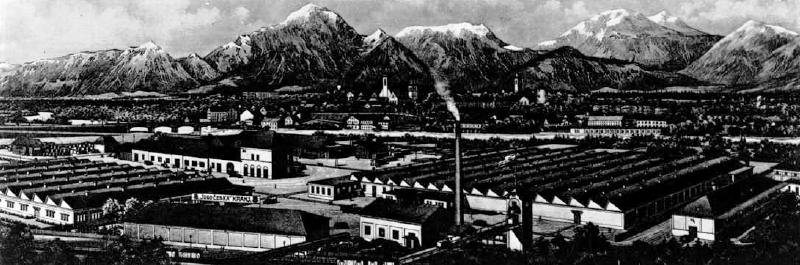 Tovarna Jugočeška